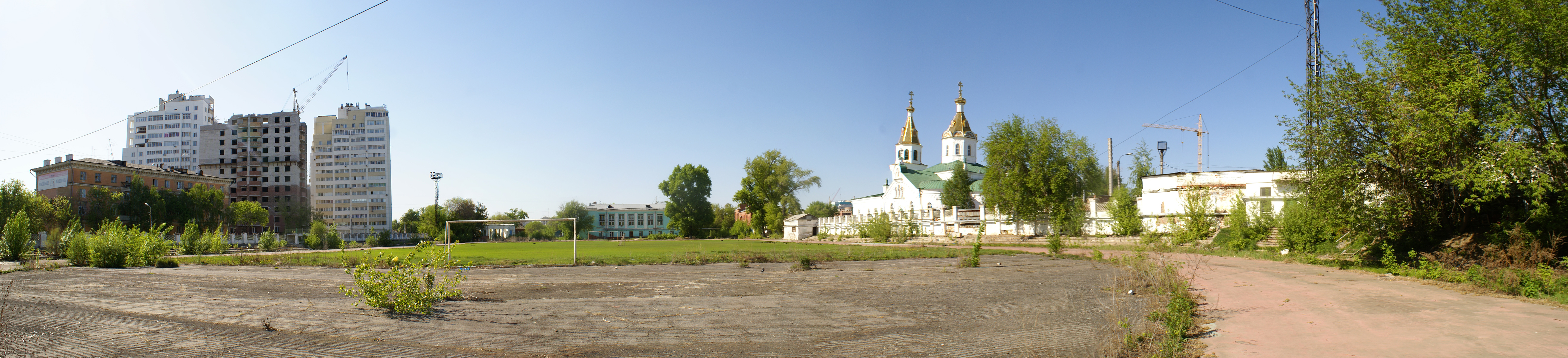 Стадион «Буревестник» в Самаре. Начал работать в 1937 году. Был разрушен в 2010 году.